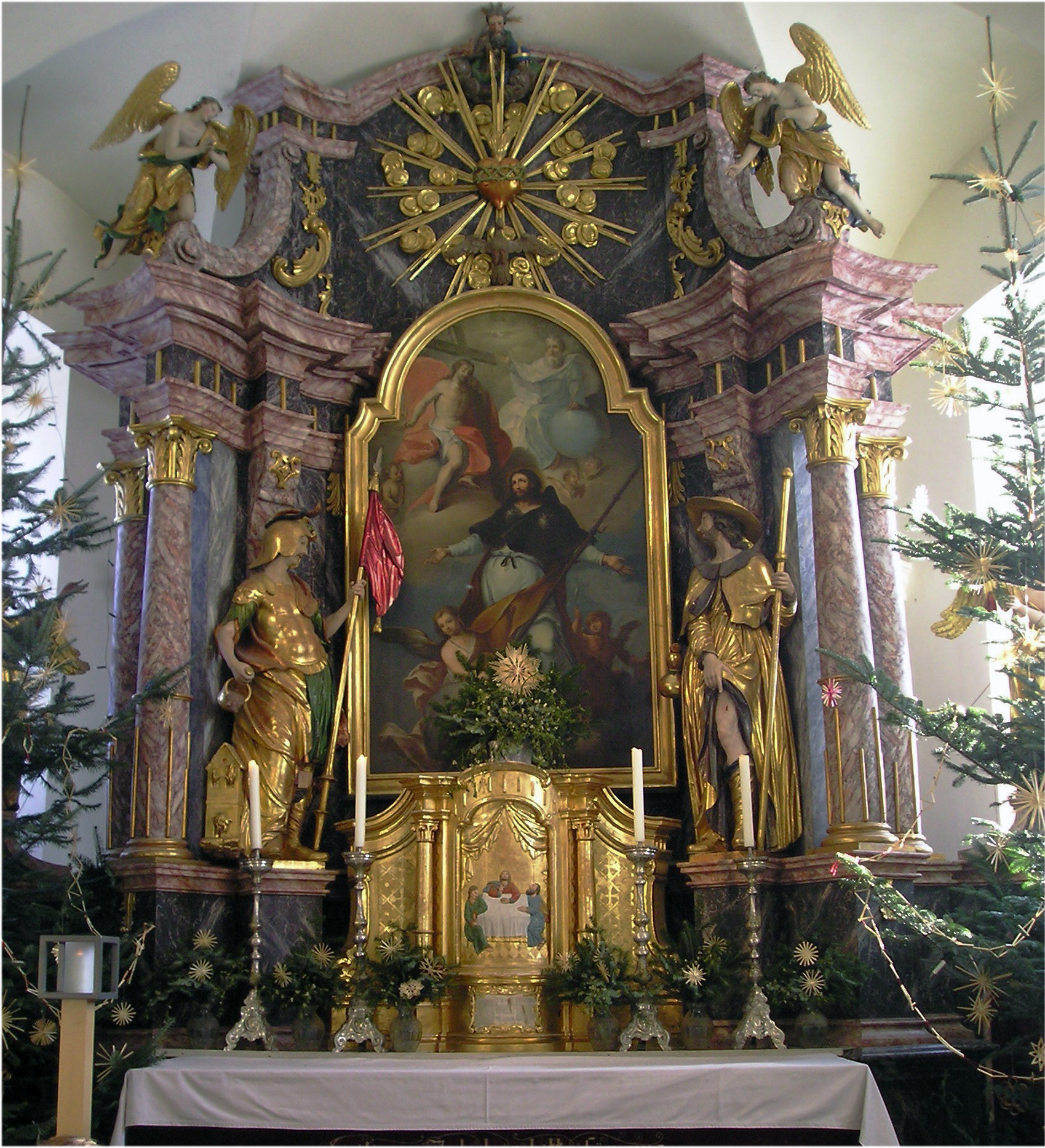 Hochaltar der röm.-kath. Kirche St. Jakob in Freiland. Foto aufgenommen von Fklug am 27.01.2006